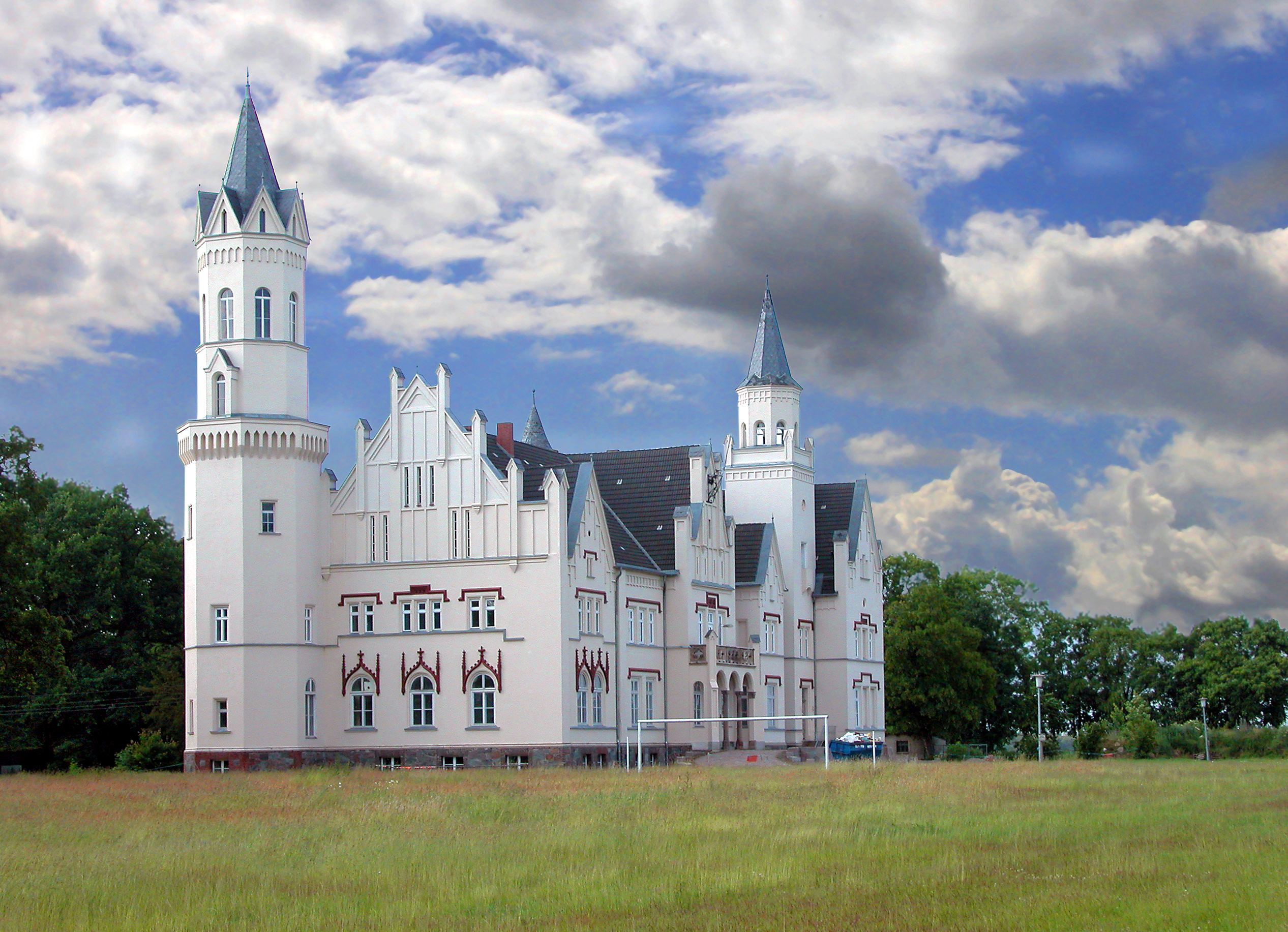 24.06.2004 17129 Kartlow (Gem. Kruckow): Kartlow wurde 1245 erstmals urkundlich erwähnt. Zu dieser Zeit befand sich hier ein Festes Haus der Herzöge von Pommern-Demmin. Woldemar von Heyden gab in der Mitte des 19. Jahrhunderts den Auftrag zum Bau des Schlosses nach Plänen Friedrich Hitzigs. 1856 wurde es bezogen, ein Neorenaissancebau im Stil der Loire-Schlösser. Bis 1945 blieb das Herrenhaus im Besitz der Familie von Heyden. In der DDR waren hier Wohnungen und ein Konsum. Heute befindet sich das Schloß in Privatbesitz, Sanierung fast vollendet Der Entwurf des Landschaftsparks stammt von Peter Joseph Lenné. [DSCN4139.JPG]20040624810DR.JPG(c)Blobelt